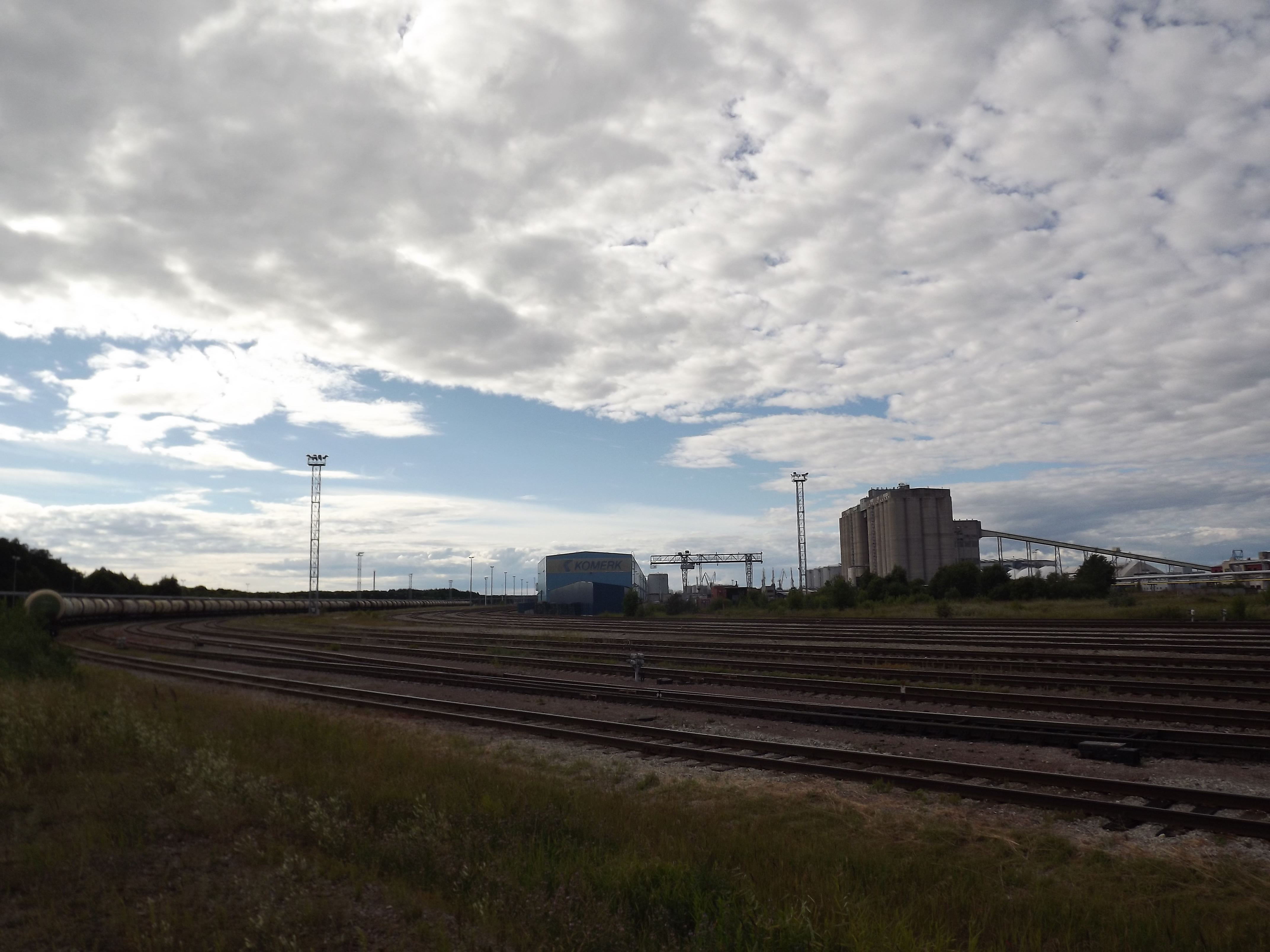 Muuga jaam